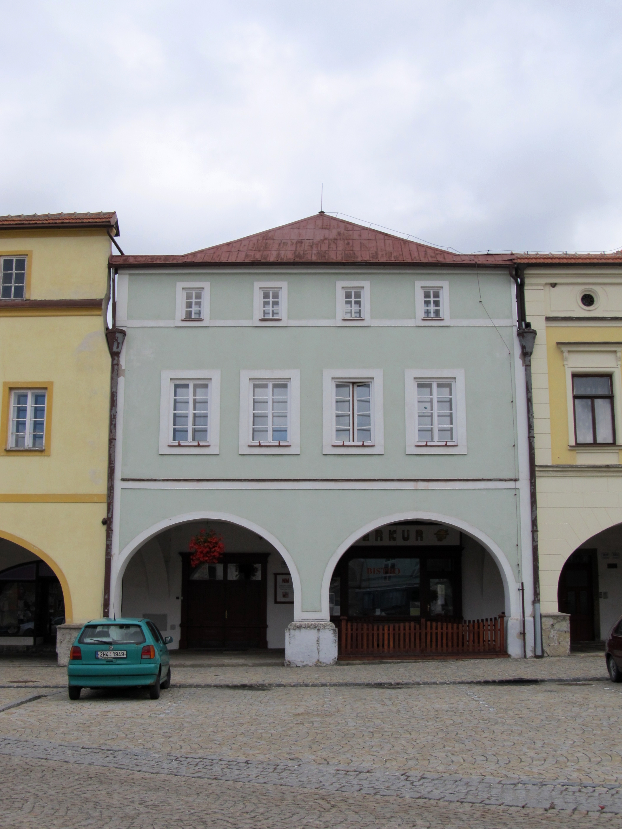 Měšťanský dům (Nové Město nad Metují), Husovo nám. 1218, Nové Město nad Metují